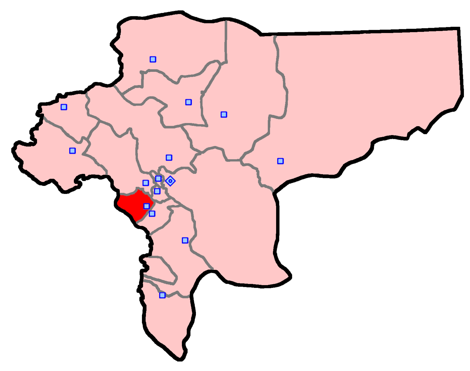 حوزهٔ انتخاباتی لنجان برای انتخابات مجلس شورای اسلامی